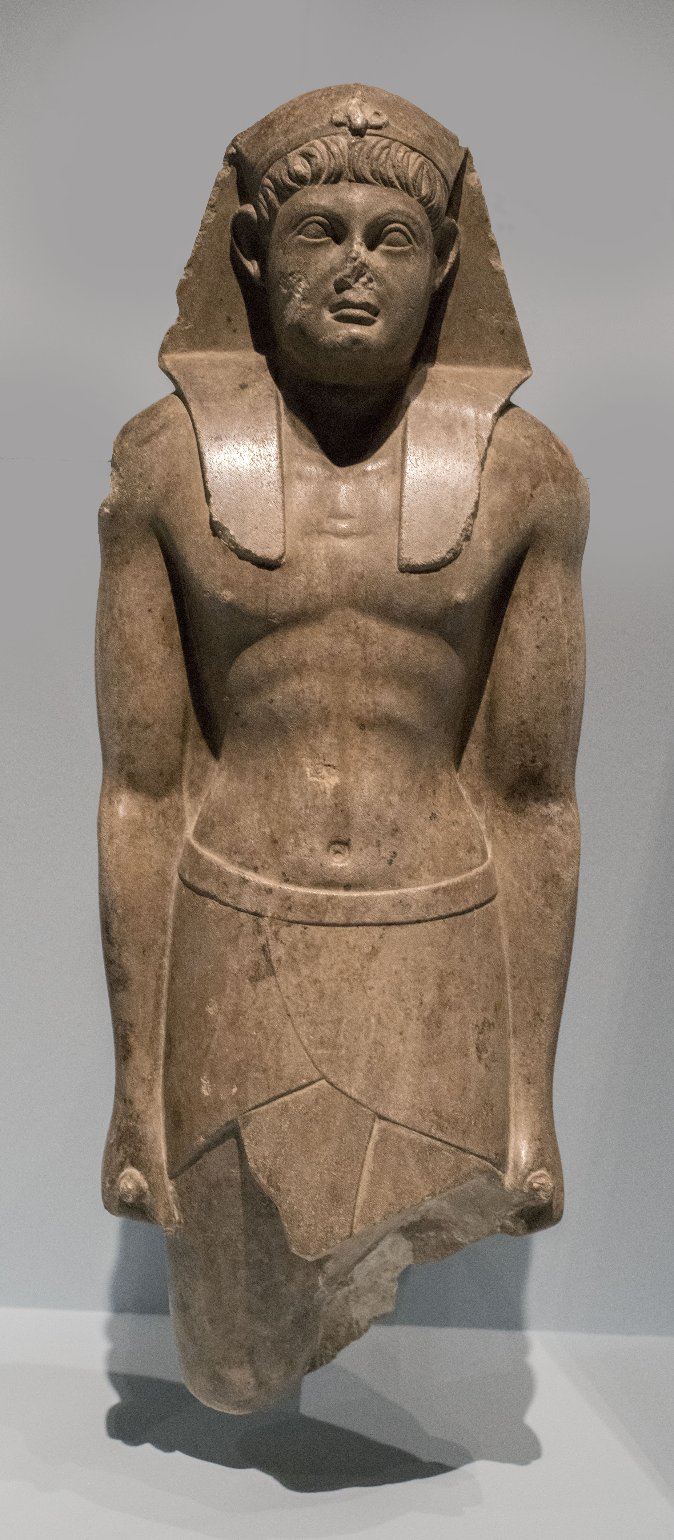 Está tallada en mármol de Carrara y representa a un soberano ptolemaico, tal vez Ptolomeo XV. Está data en finales del siglo I a.C. Pertenece al Museo Civico di Palazzo Te, Museo Egizio, Mantua. Se expuso en Arte Canal, Madrid, en "Cleopatra y la fascinación de Egipto".